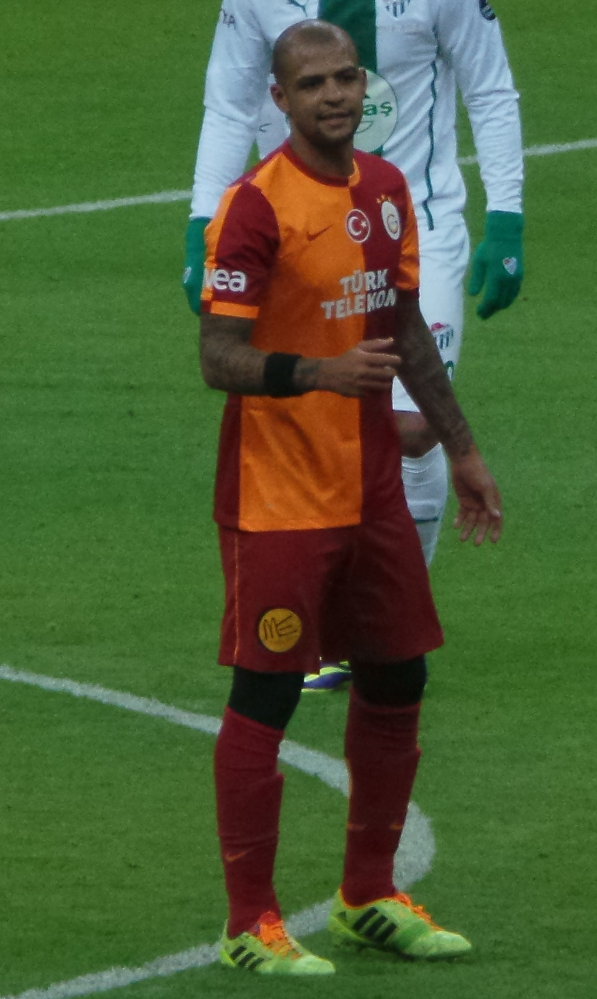 Melo in his 100th match